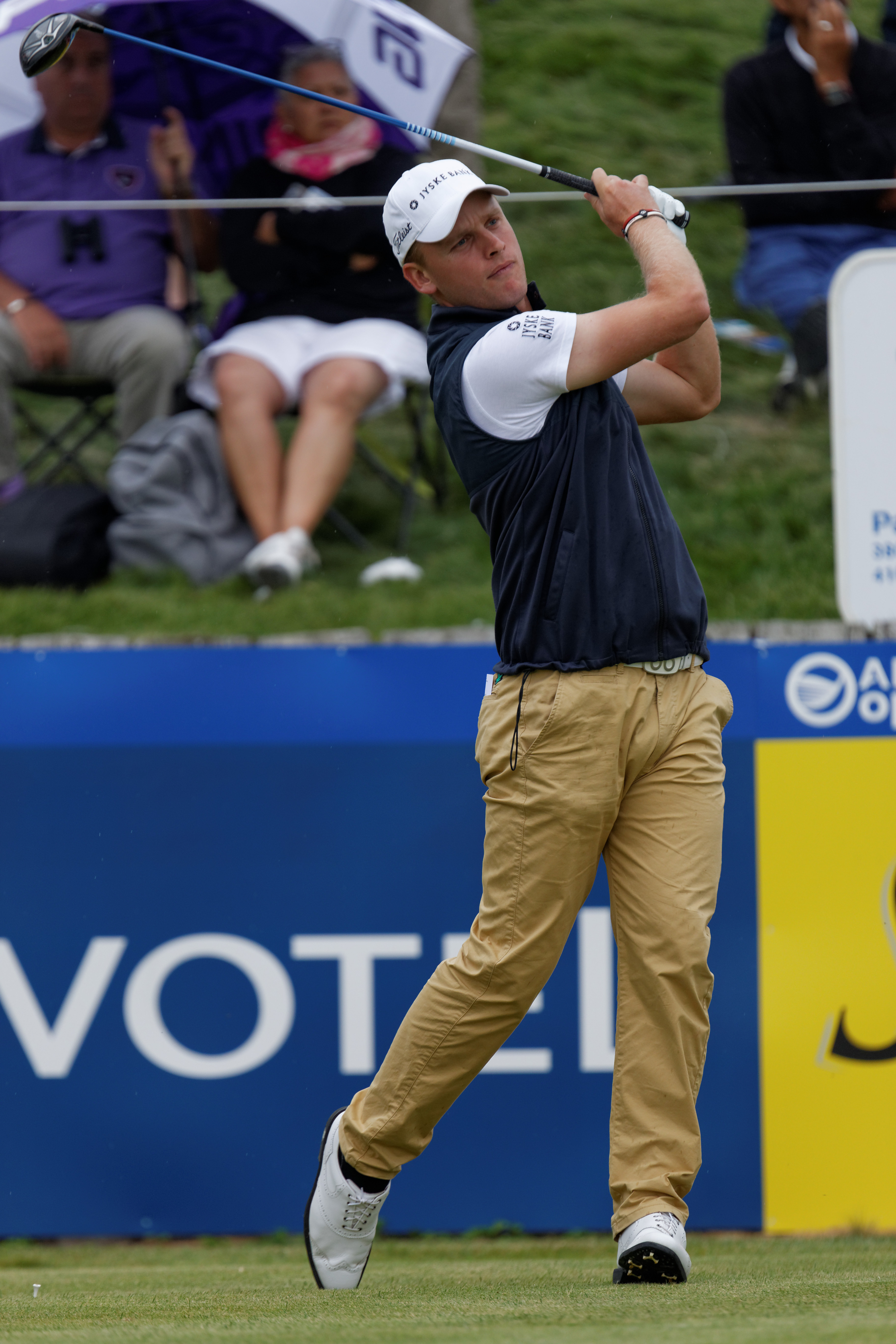 Morten Orum Madsen lors du second tour de l'Open de France 2014 - Golf National - Saint-Quentin-en-Yvelines (78) - départ du trou n°1